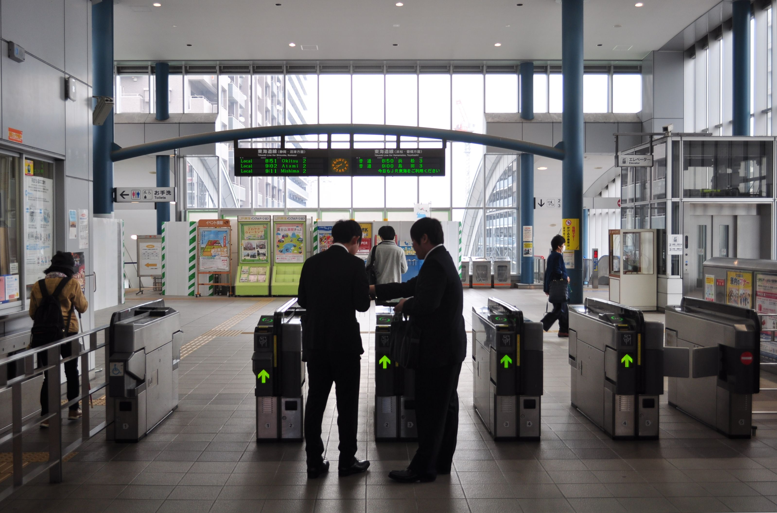 藤枝駅 改札口